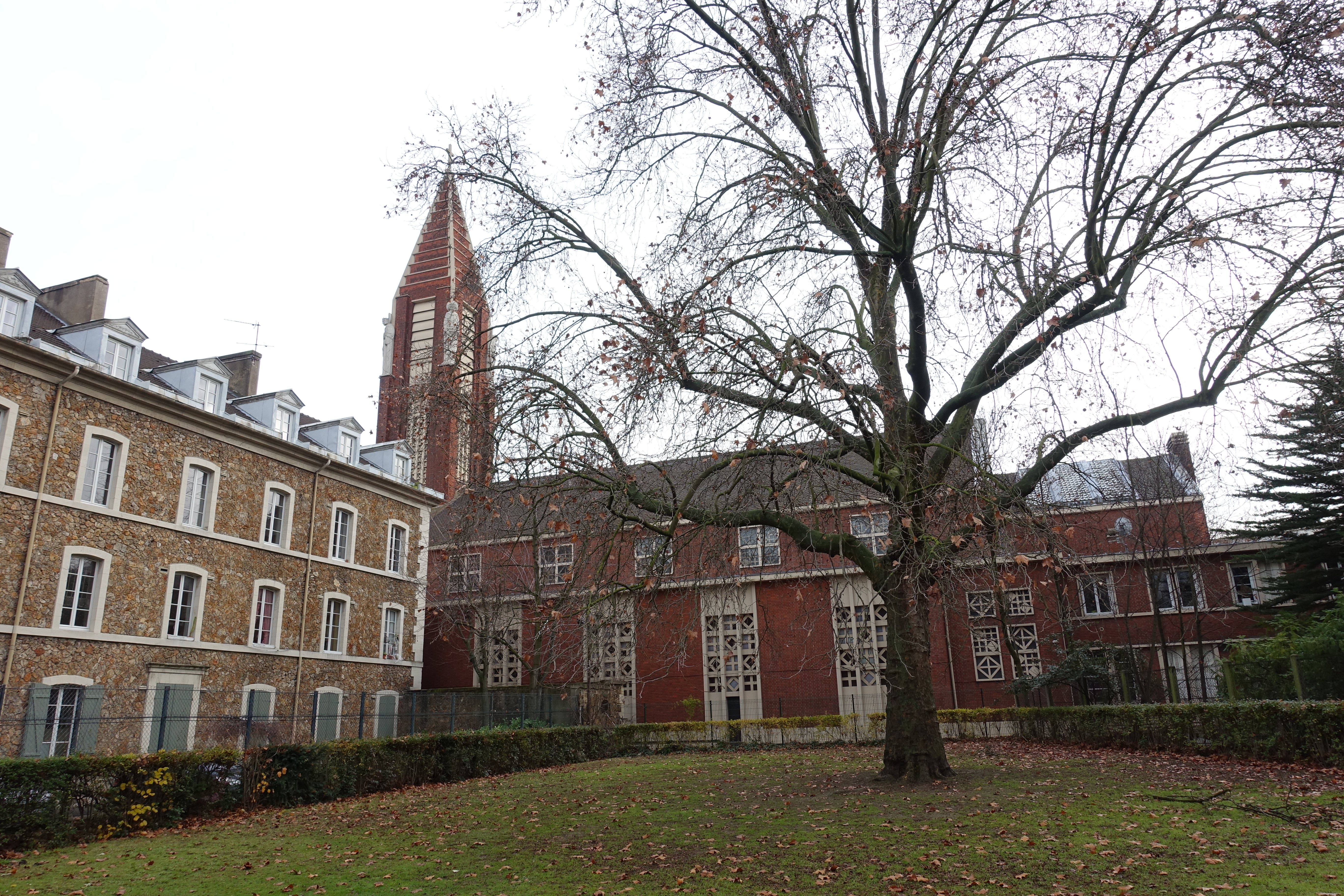 Square du Cardinal Verdier @ Paris Église Saint-Antoine de Padoue, 52 Boulevard Lefebvre, 75015 Paris, France.